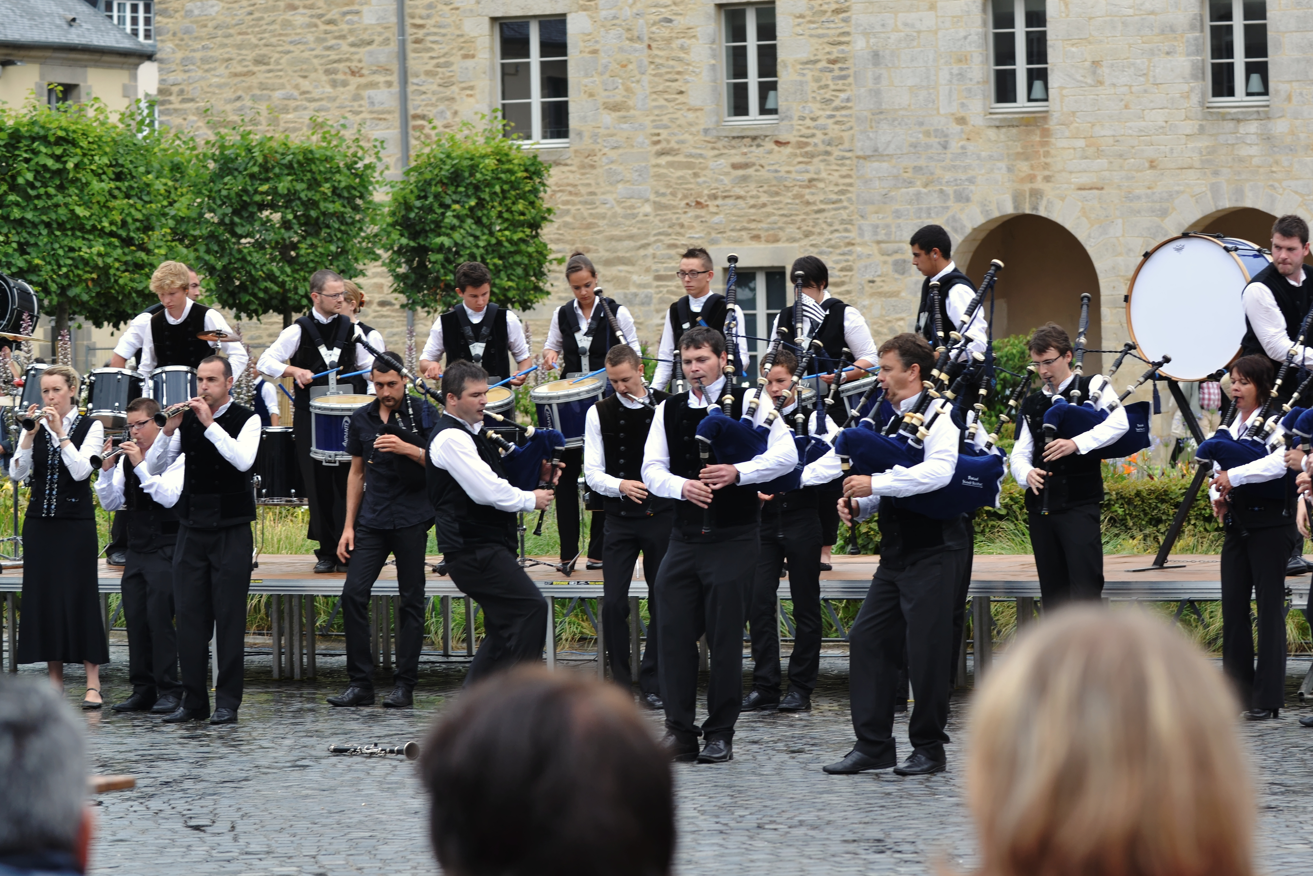 Le Bagad Konk Kerne lors du championnat national des bagadoù (troisième catégorie) au Festival de Cornouaille, Esplanade François Mitterrand à Quimper, le 27 juillet 2013.